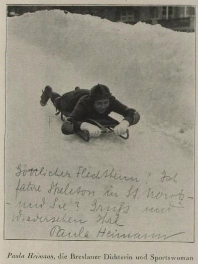 Paula Heimann rodelt in St. Moritz. Mit einer Widmung für Alfred Flechtheim